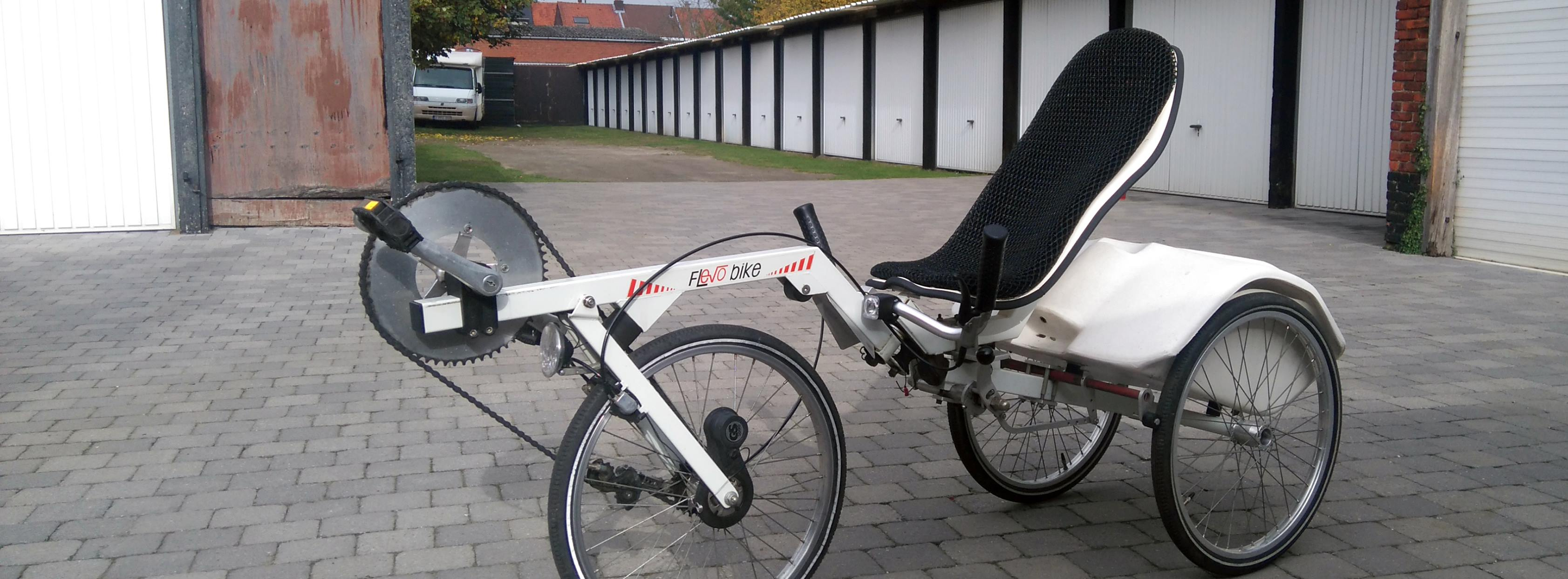 Flevobike tricycle